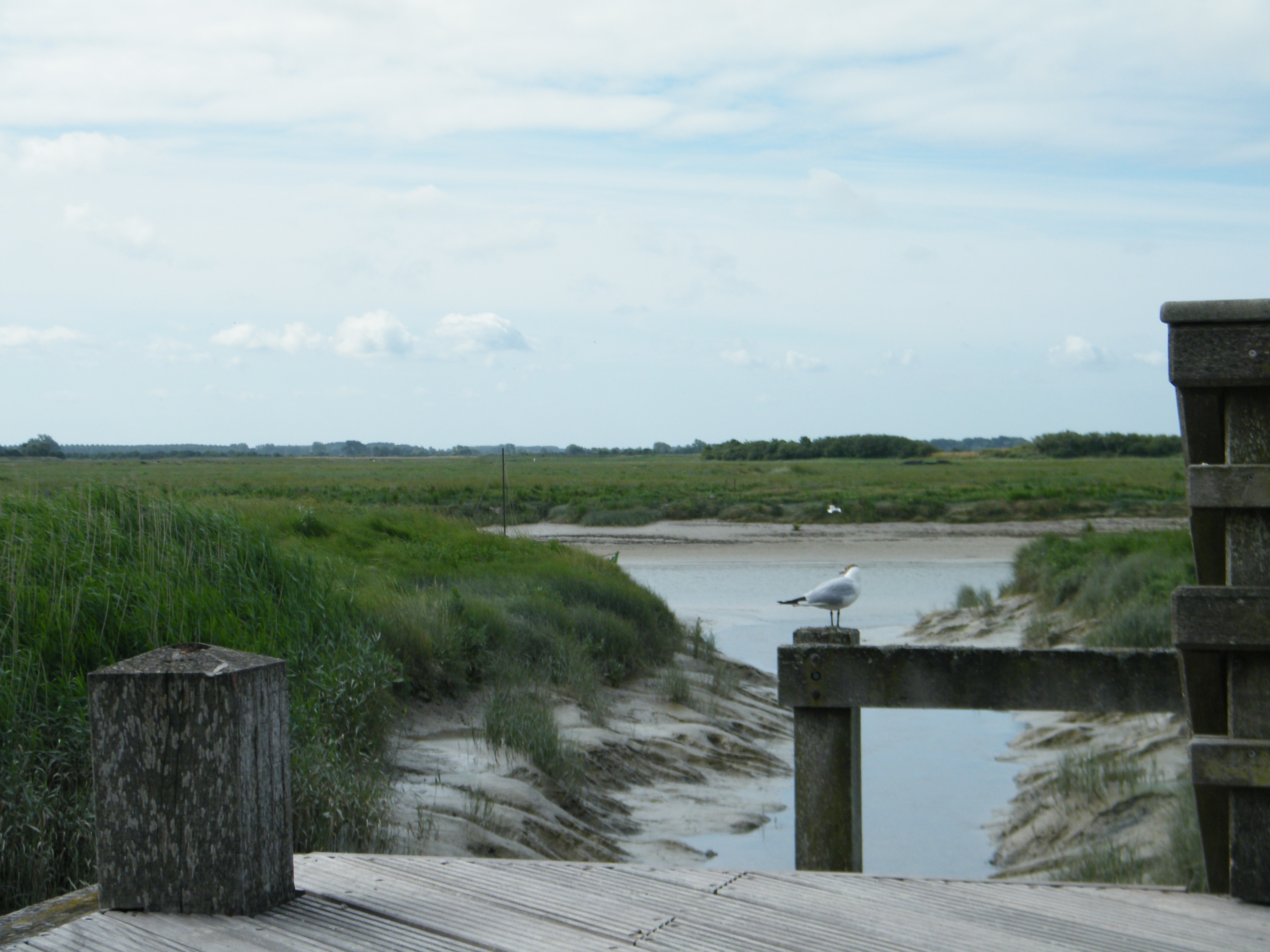 Le Fliers se jette dans l'Authie, port de la Madelon, Waben, Pas-de-Calais, France, marée basse.